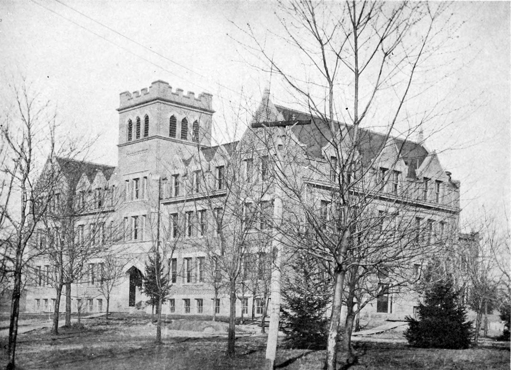 Main Hall, West Virginia Wesleyan College, Buckhannon, West Virginia